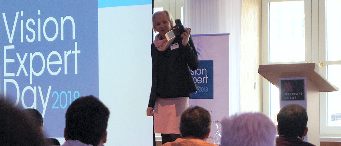 Dana Diezemann gibt eine Zusammenfassung des Tages